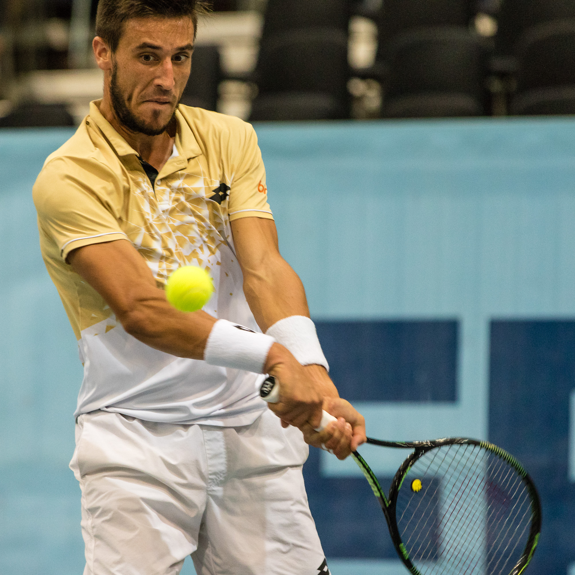 Damir Dzumhur (BIH) spielt gegen Adam Pavlasek (CZE) in Qualifikation zu Erste Bank Open ATP World Tour 500 in Wien am 23.10.2016